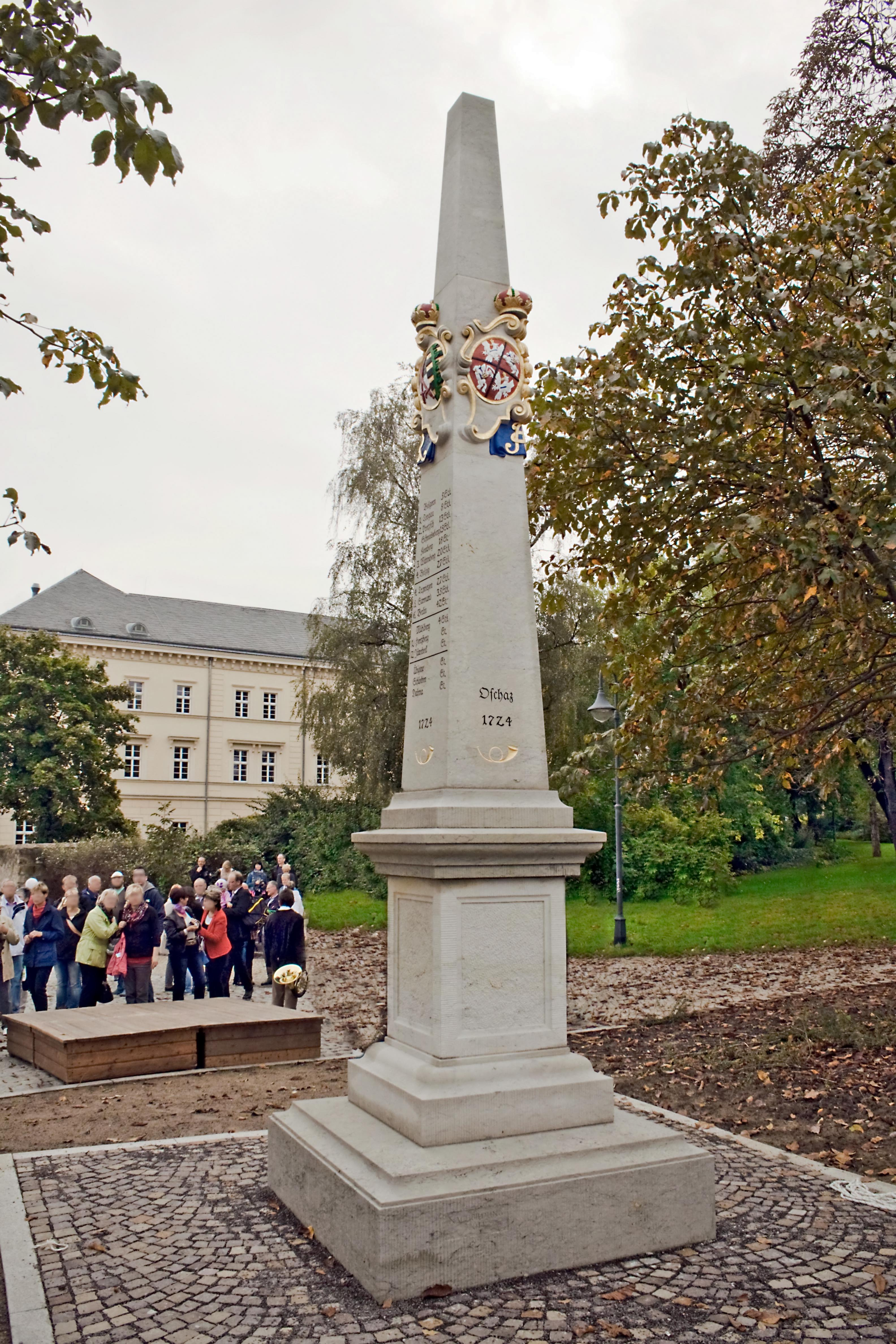 Kursächsische Postmeilensäule-Distanzsäule am Ende der Brüderstraße in Oschatz